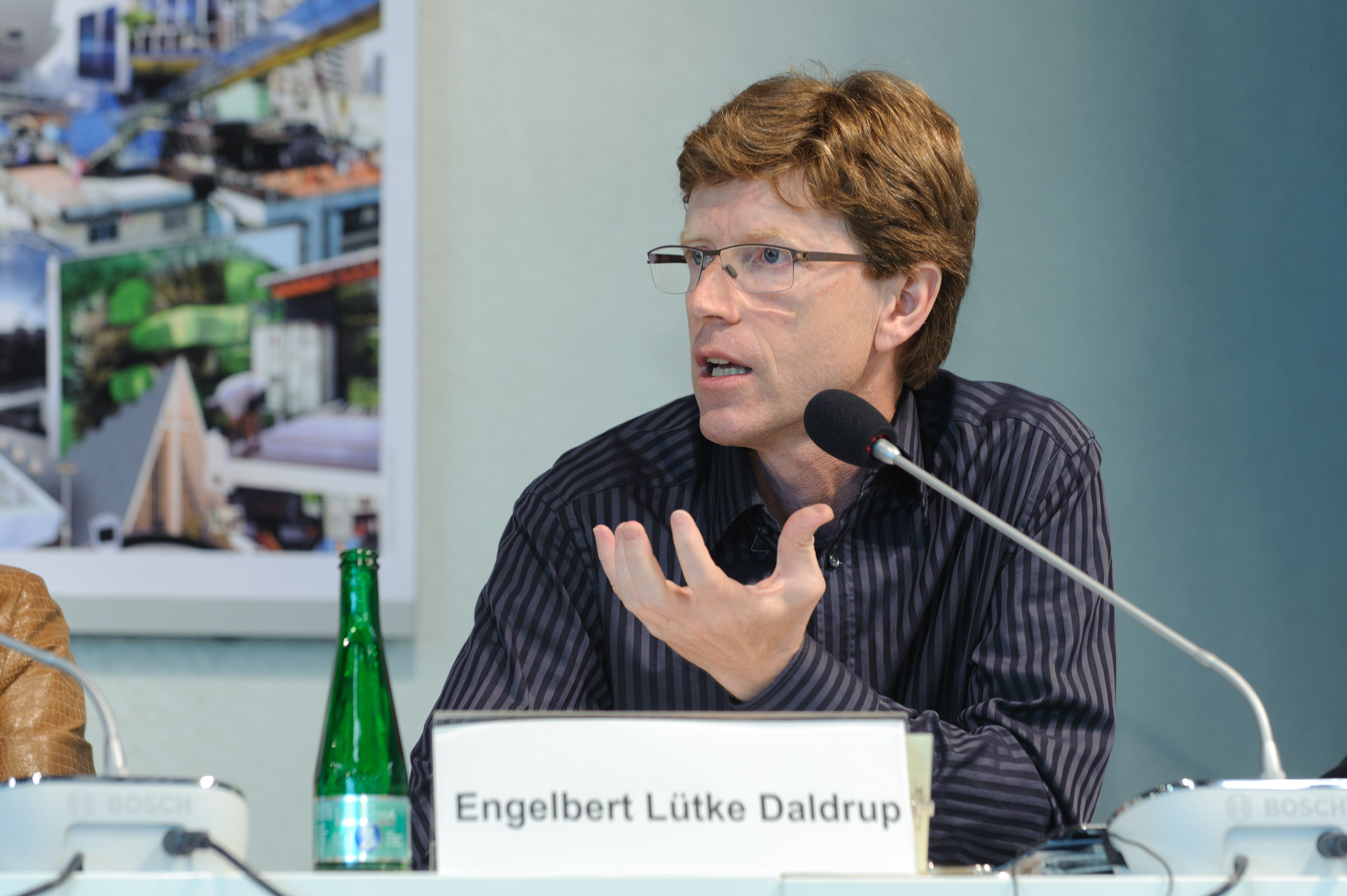 Engelbert Lütke Daldrup (Honorarprofessor f. Raumentwicklung, Uni Leipzig) Foto: Stephan Röhl